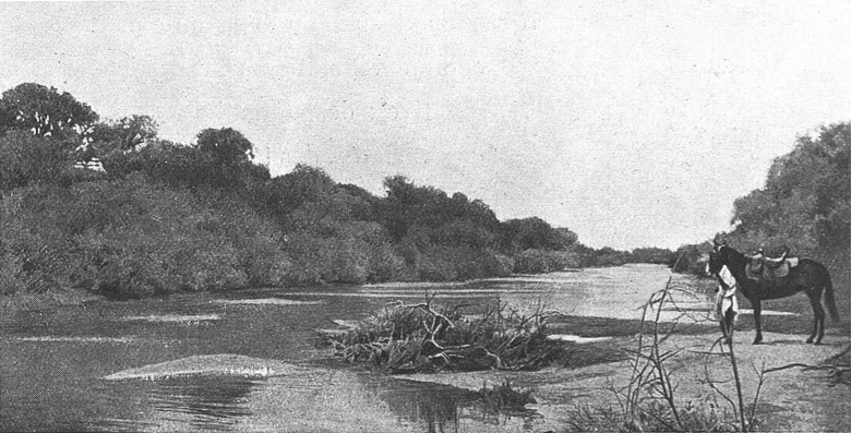 Brousse de bordure de la Komadougou-Yôbé, près Doutchi. Bornou.